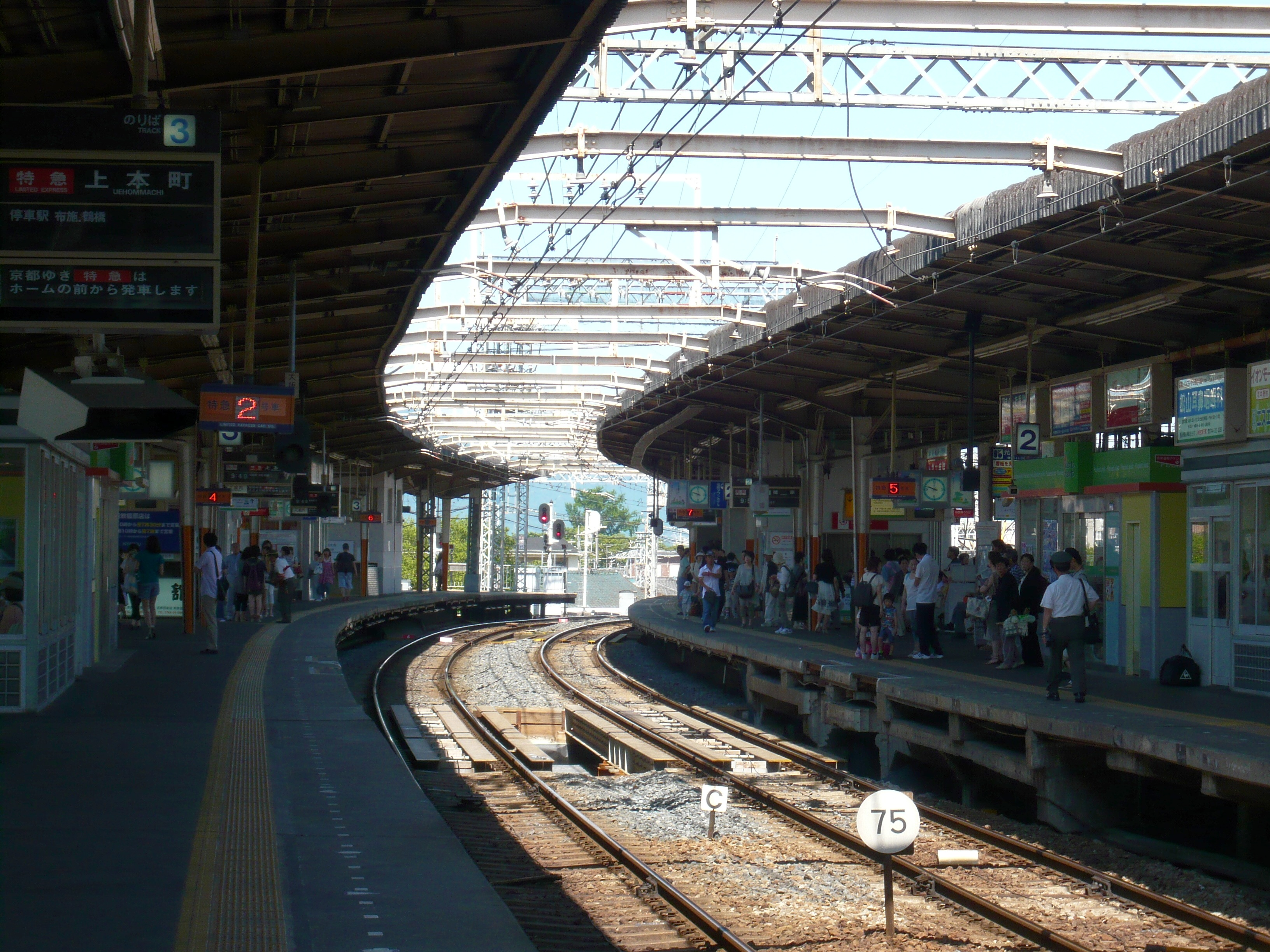 近鉄大和八木駅・大阪線ホームにて Yamato-Yagi station, Kintetsu Ōsaka line 2011.7.17